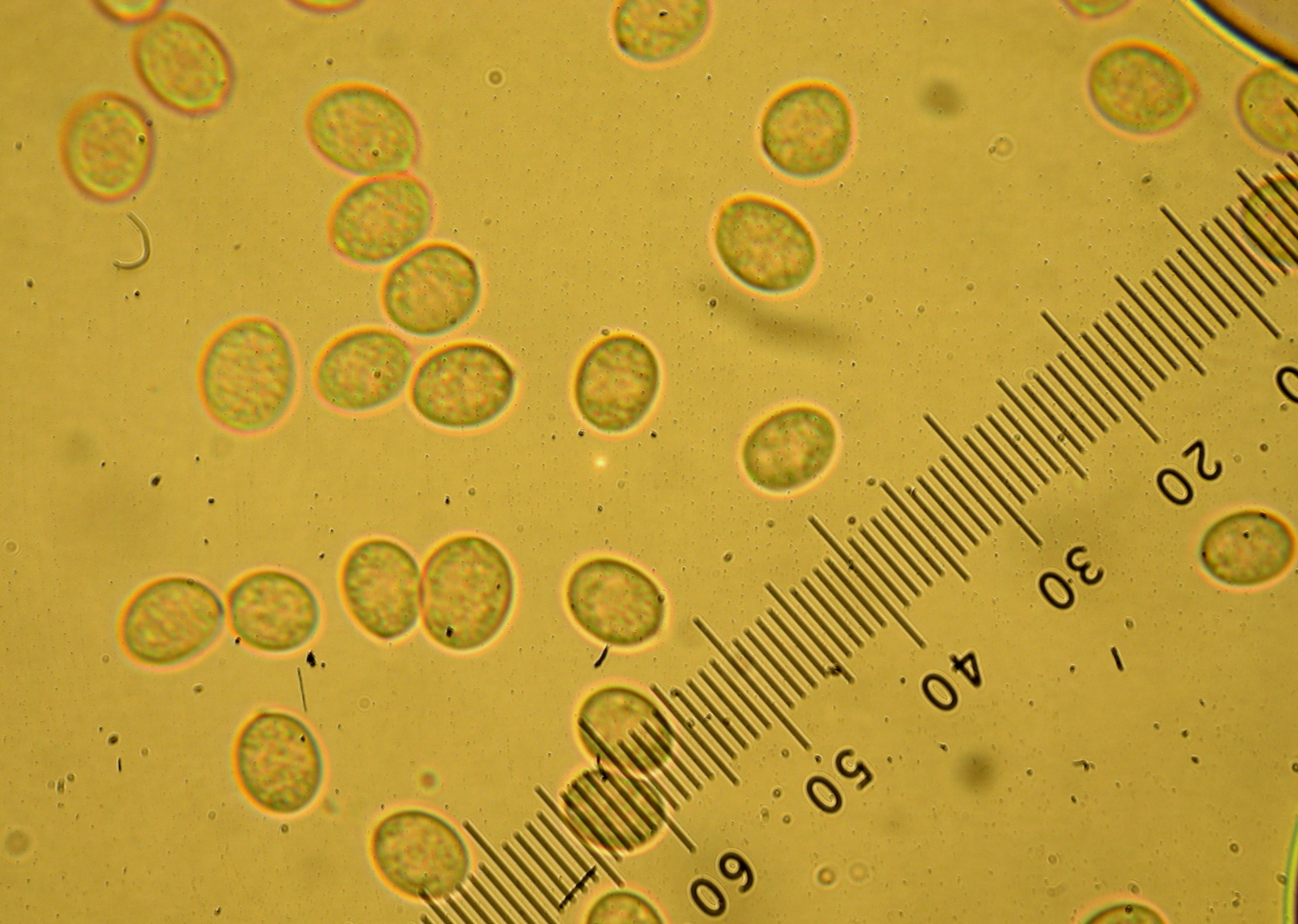 Tubaria furfuracea (Pers.) Gillet